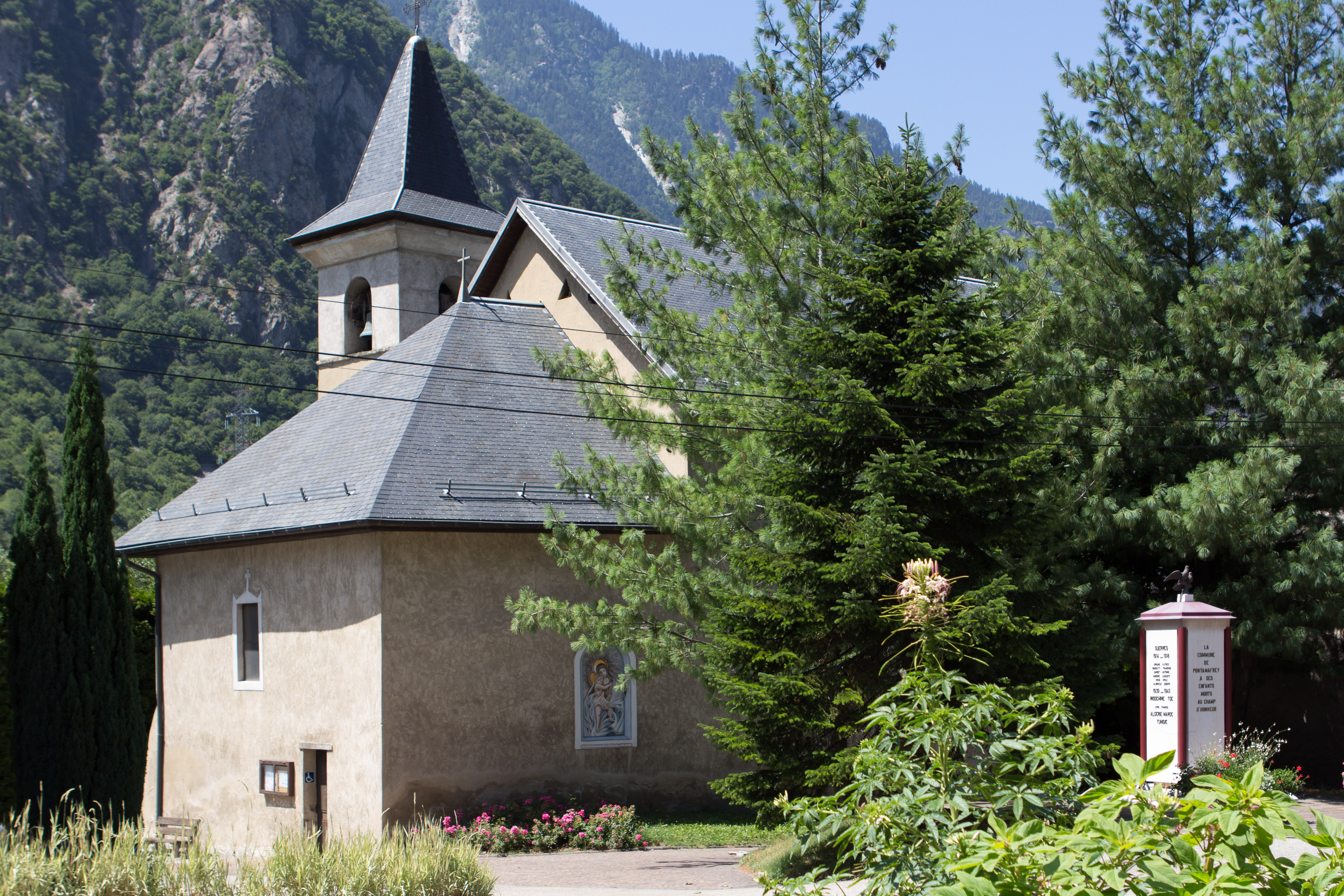 L'église de Pontamafrey / Pontamafrey-Montpascal / Savoie / France